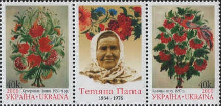 Поштові марки на честь Тетяни Пати, майстра петриківського розпису